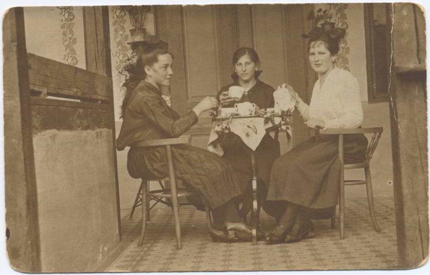 נשות קהילת טעטש